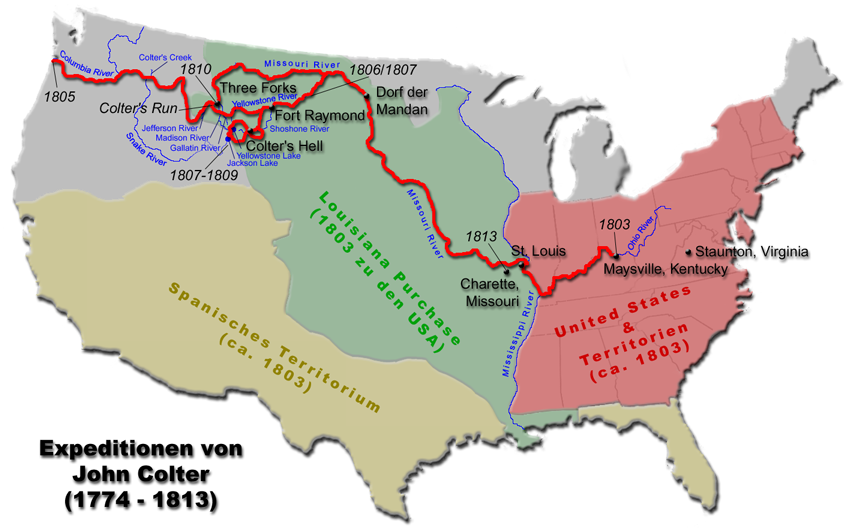 Karte - Expeditionen des John Colter zwischen 1803 und 1810